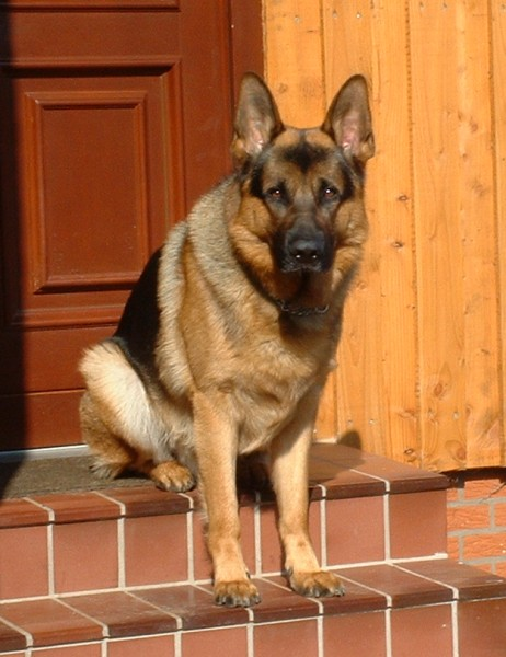 Deutscher Schäferhund, Alter: 3 1/3 Jahre